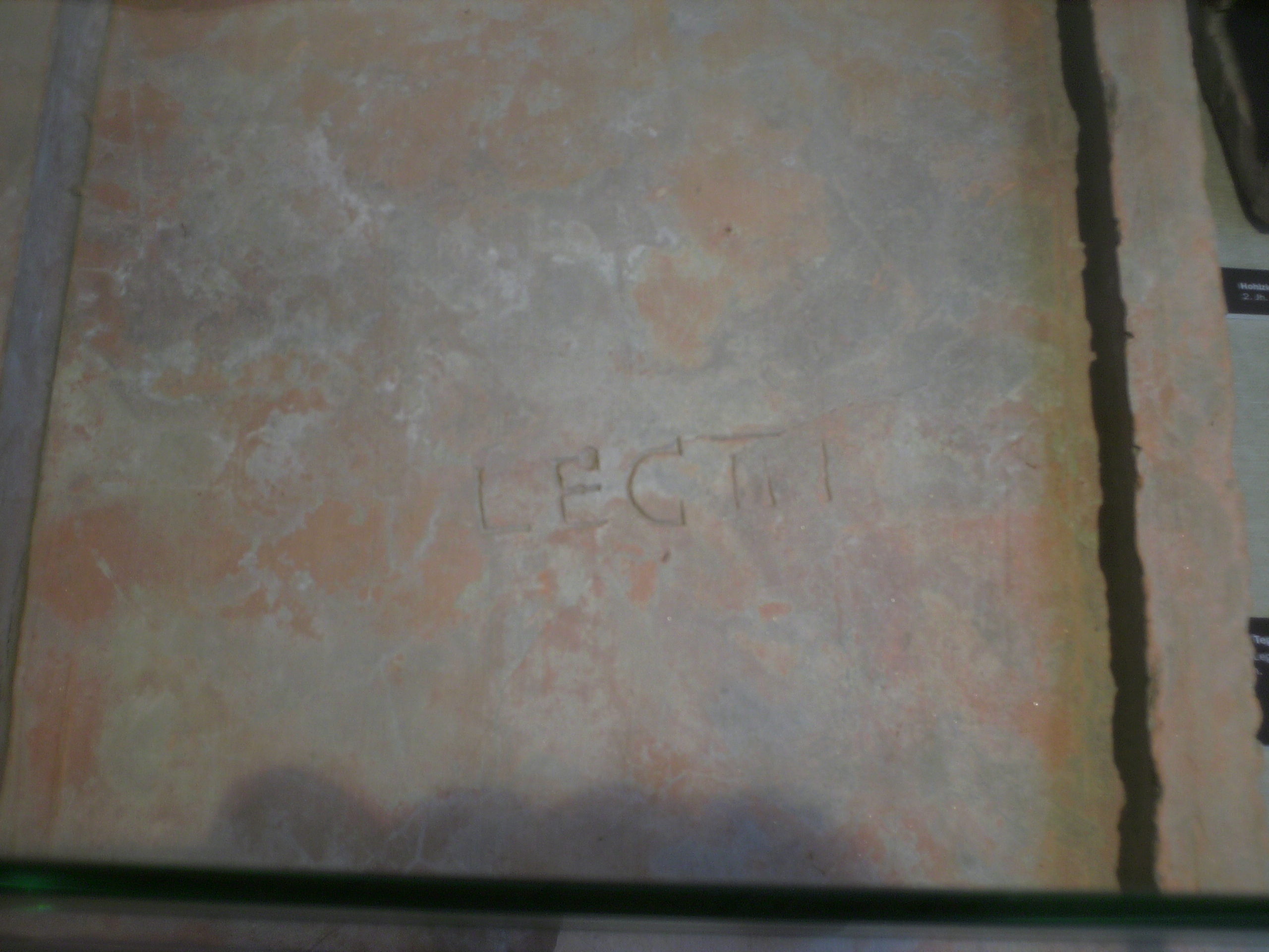 Ziegelstempel der Legio II Italica, Fundort Kastell Cannabiaca, Österreich, Ausstellungsstück im Schauraum des Gemeindeamtes Zeiselmauer-Wolfpassing, entgeltfrei zugänglich.